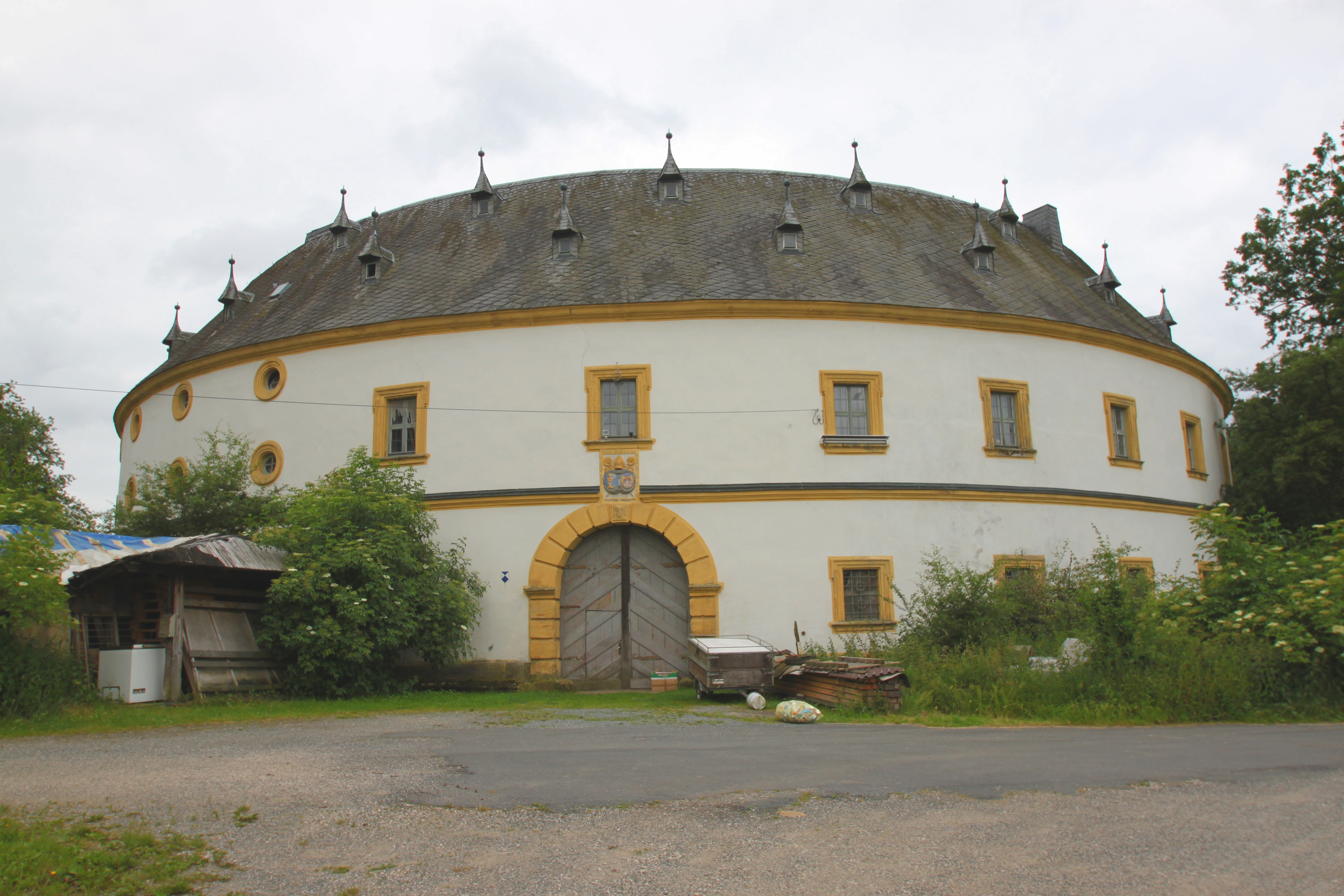 Der Gutshof Nassanger ist ringförmig dreigeschossig, um einen elliptischen Hof angelegt. Er ist ein ehemaliger Wirtschafts- und Lagerhof des Klosters Langheim, 1692/93, und wurde vermutlich nach Plänen von Leonhard Dientzenhofer gebaut. Baudenkmal D-4-78-139-223